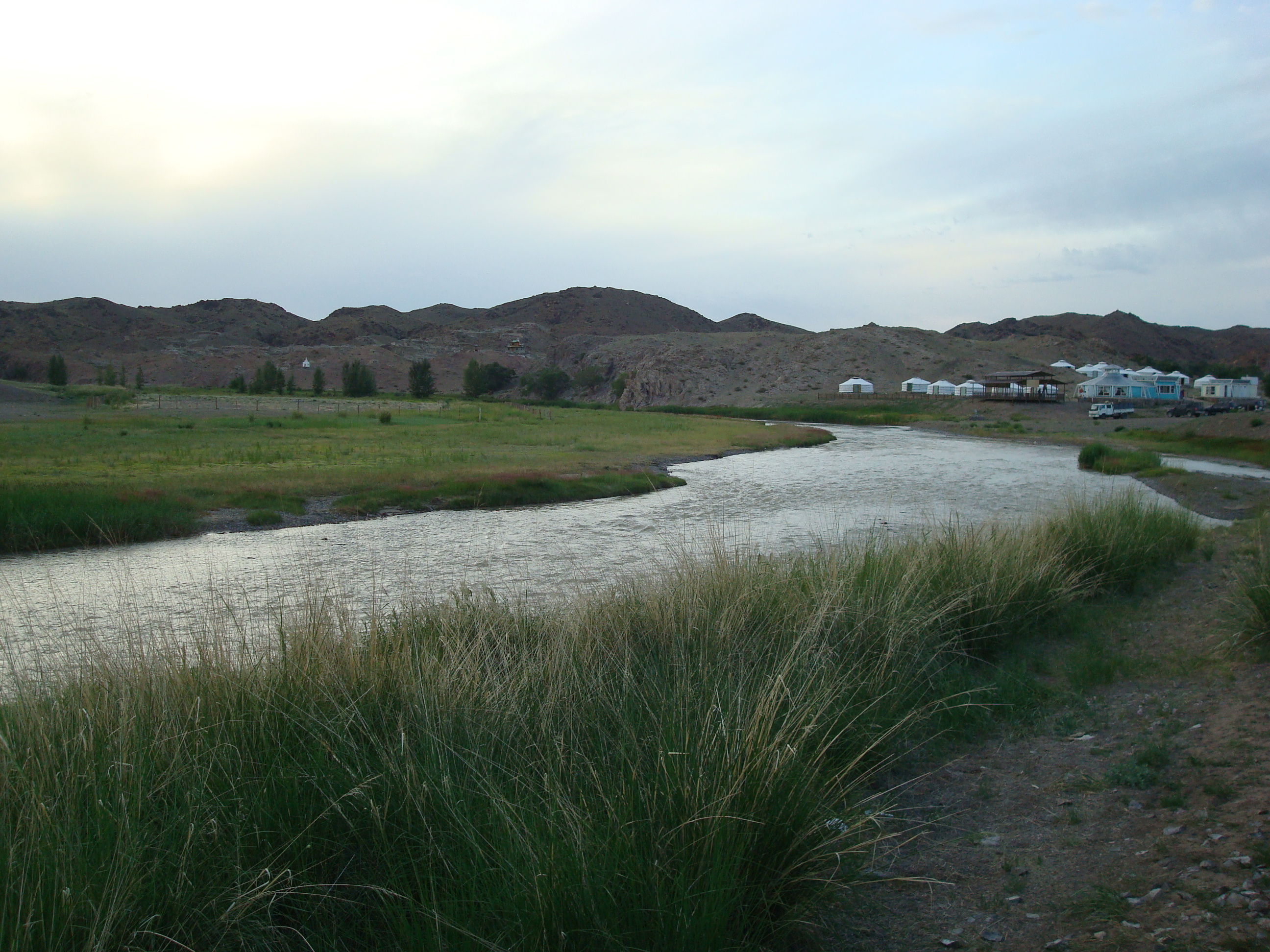 Jurtencamp am Ongi